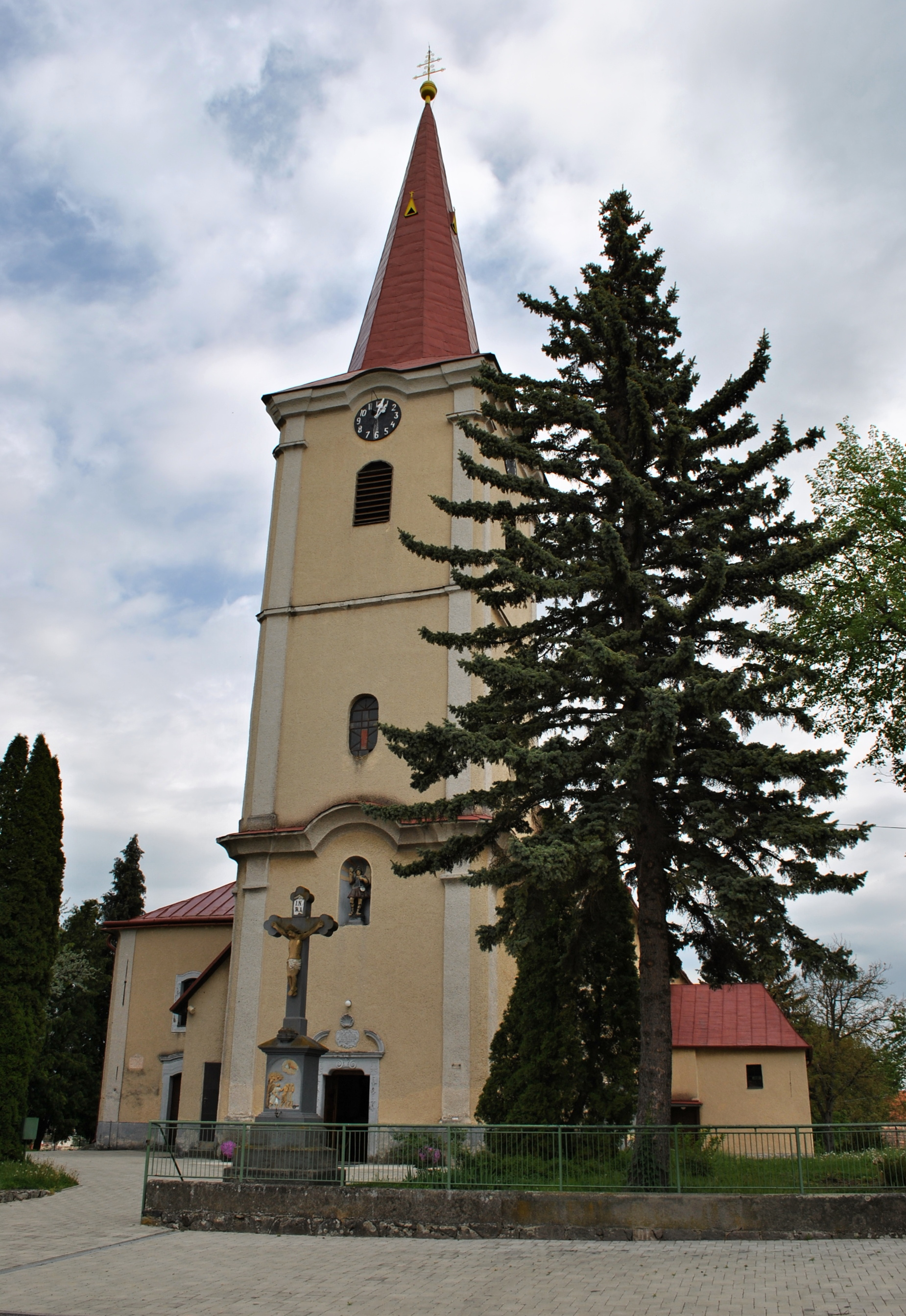 Kostol